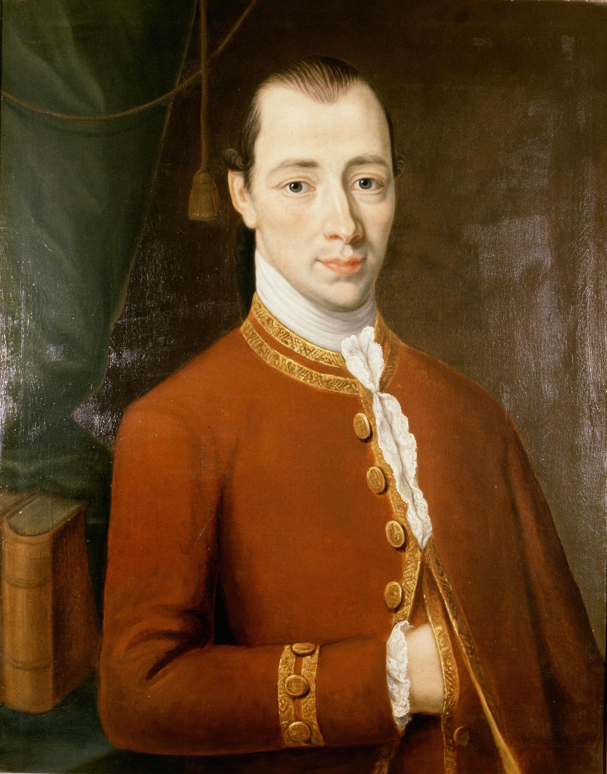 Wolter Kymmell (1752-1830)